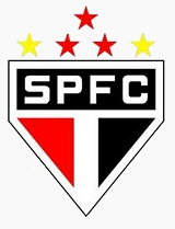 Logo (derivate): São Paulo Futebol Clube, Brazil.